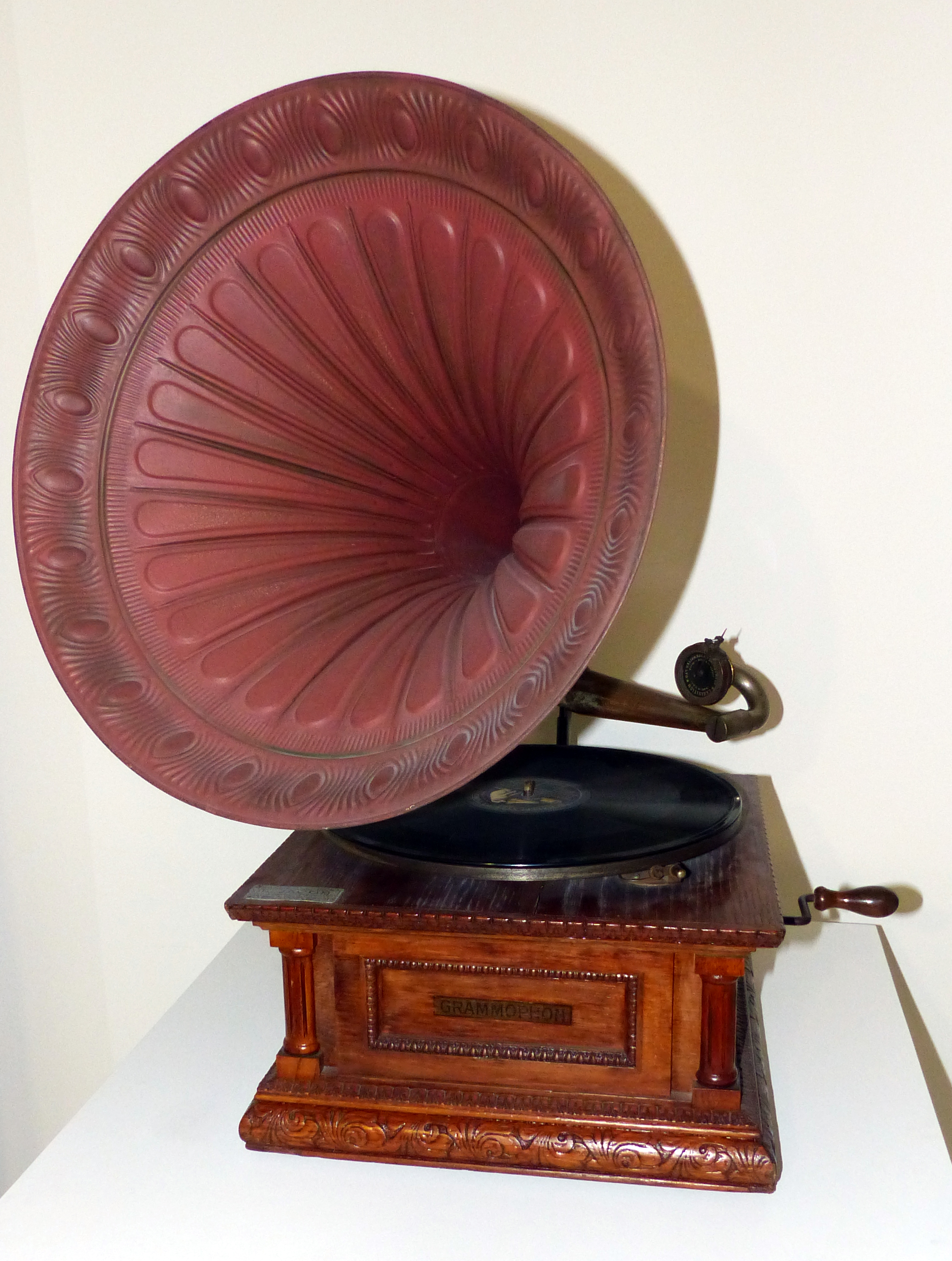 Grammophon, Haus der Musik (Fruchtkasten), Landesmuseum Württemberg, Stuttgart